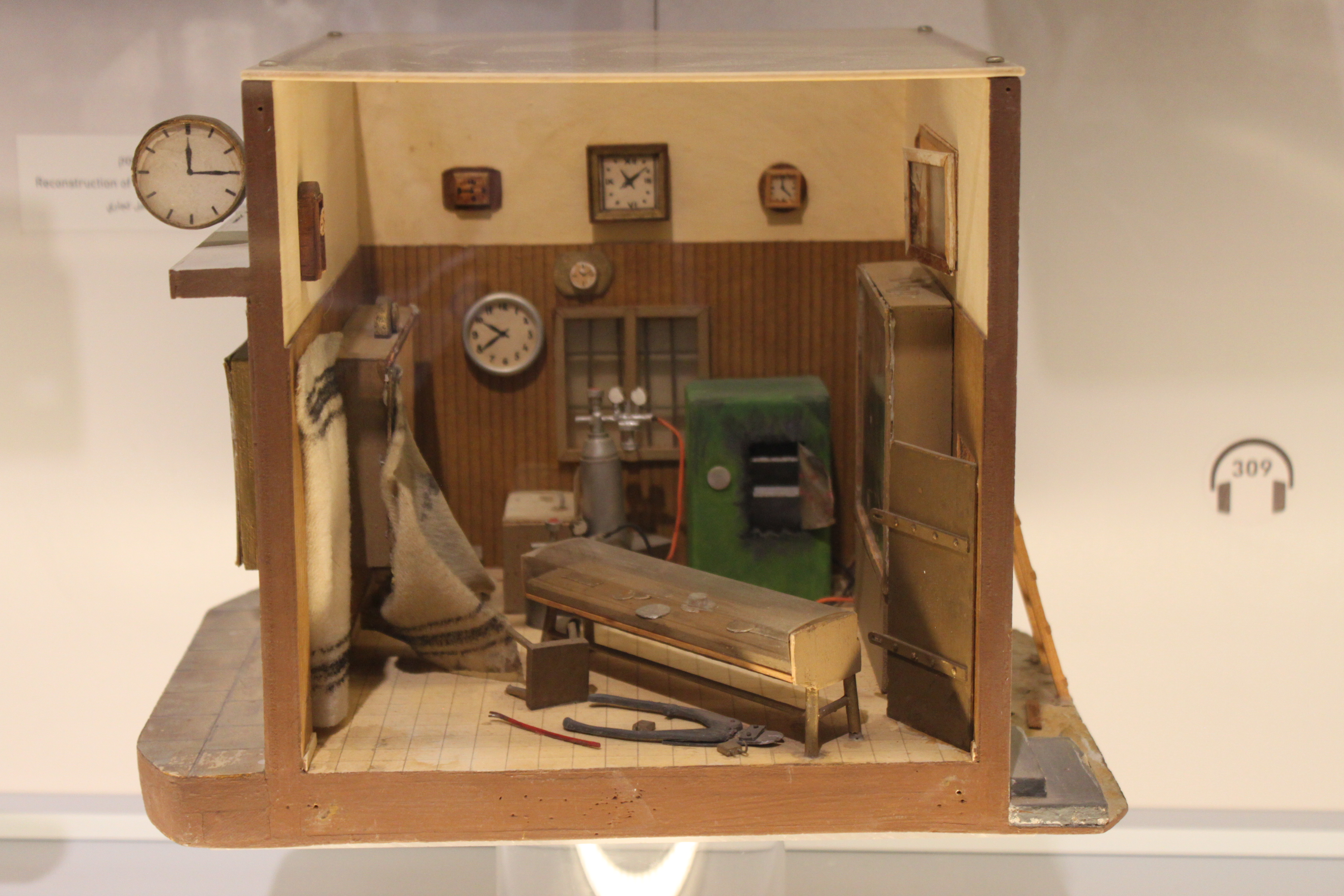 אחד מדגמי מנשה שקמוני הנמצא בבית מורשת משטרת ישראל